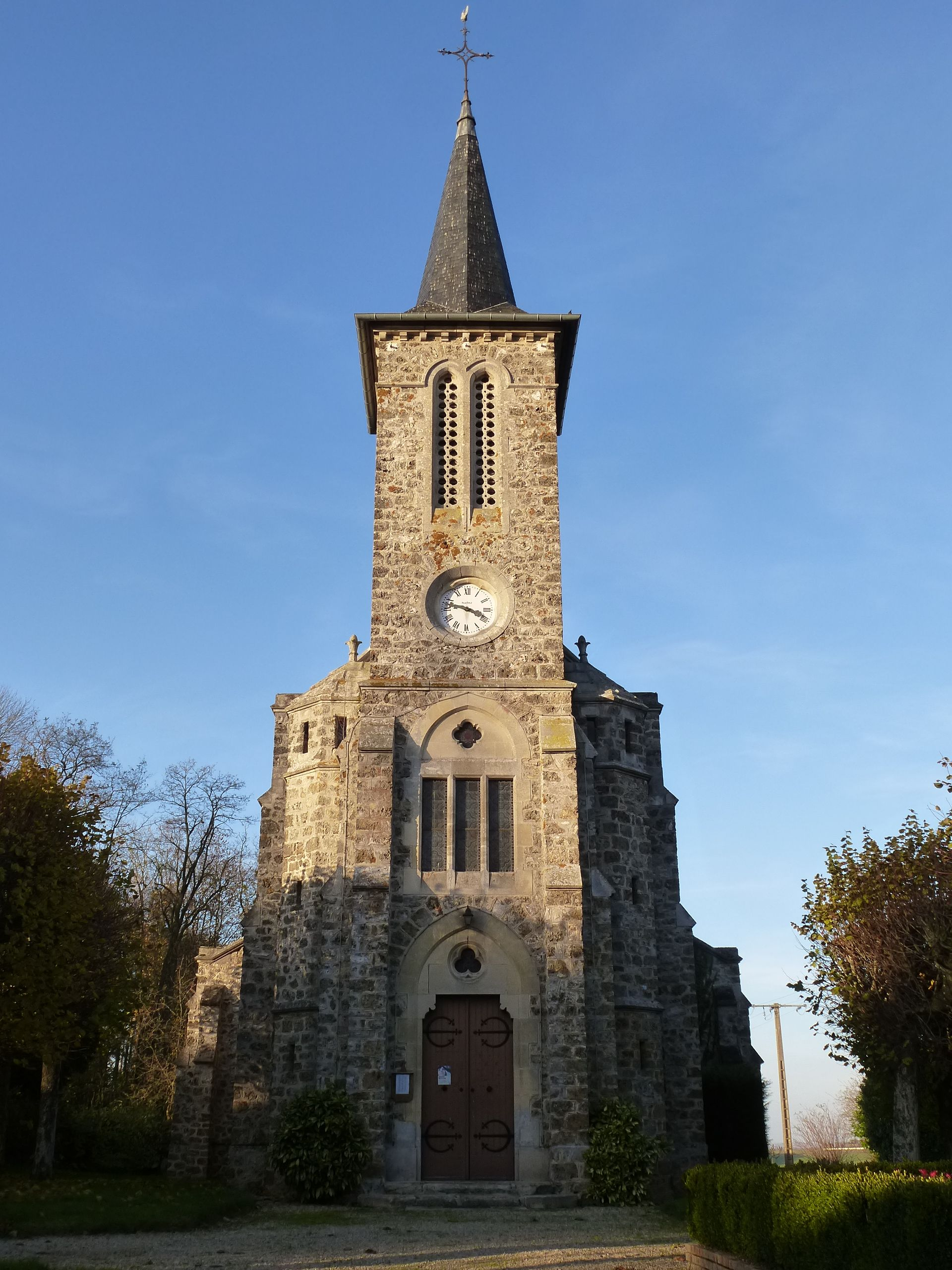 Église Saint-Christophe de Villemareuil. (Seine-et-Marne, région Île-de-France).